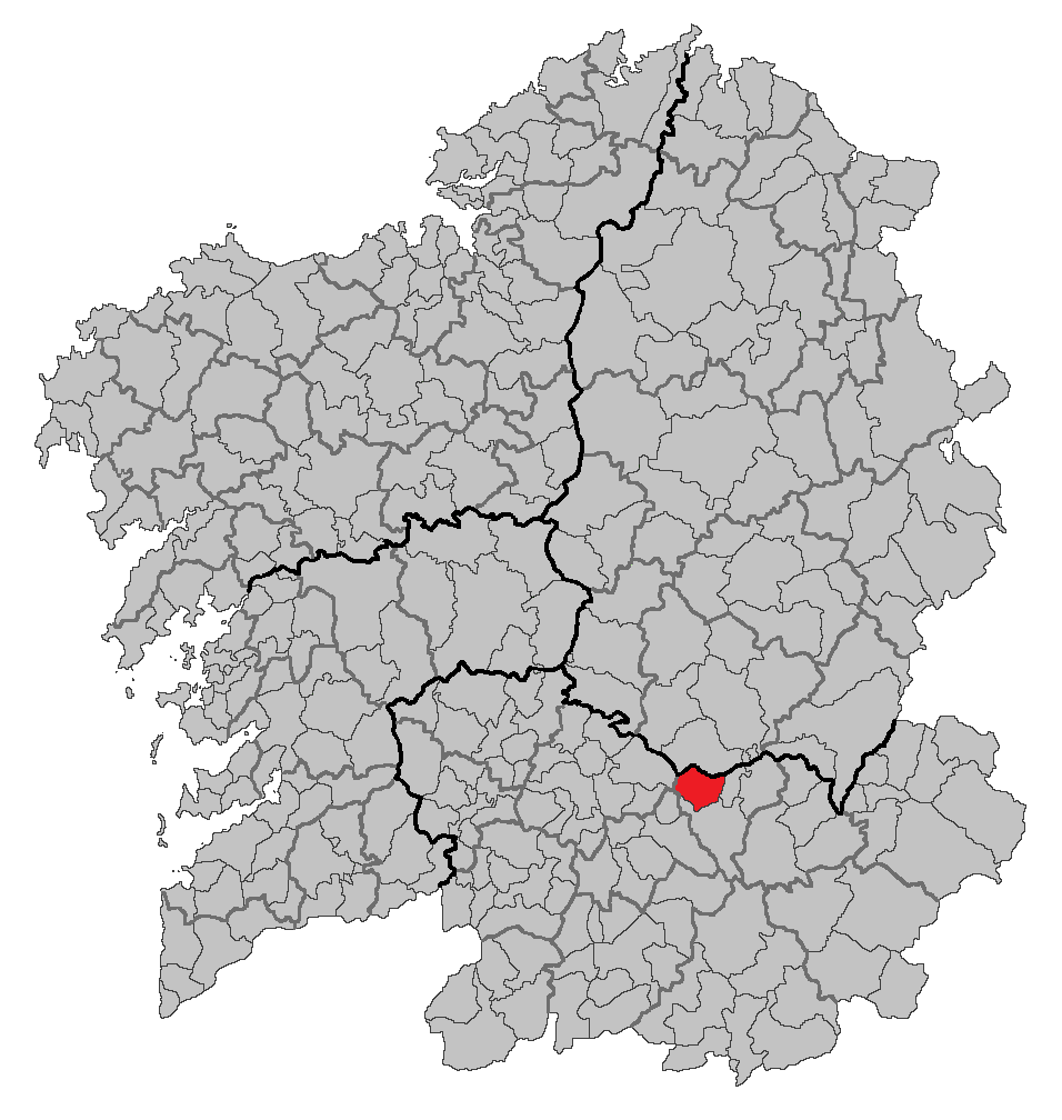 Mapa coa localización do concello de Parada de Sil.